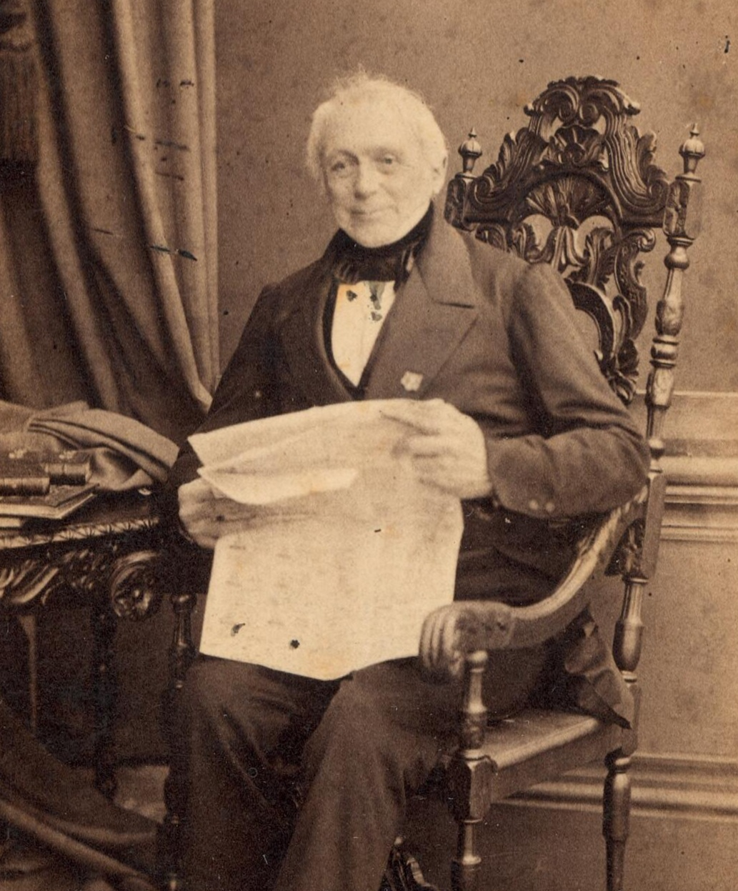 Detail van een carte-de-visite van jhr. mr. Hendrik Johan Caan, gemaakt door Robert Severin